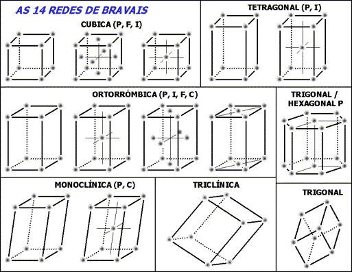 As diferentes células unitárias das redes de Bravais. Fonte: versão Redes_de_Bravais.